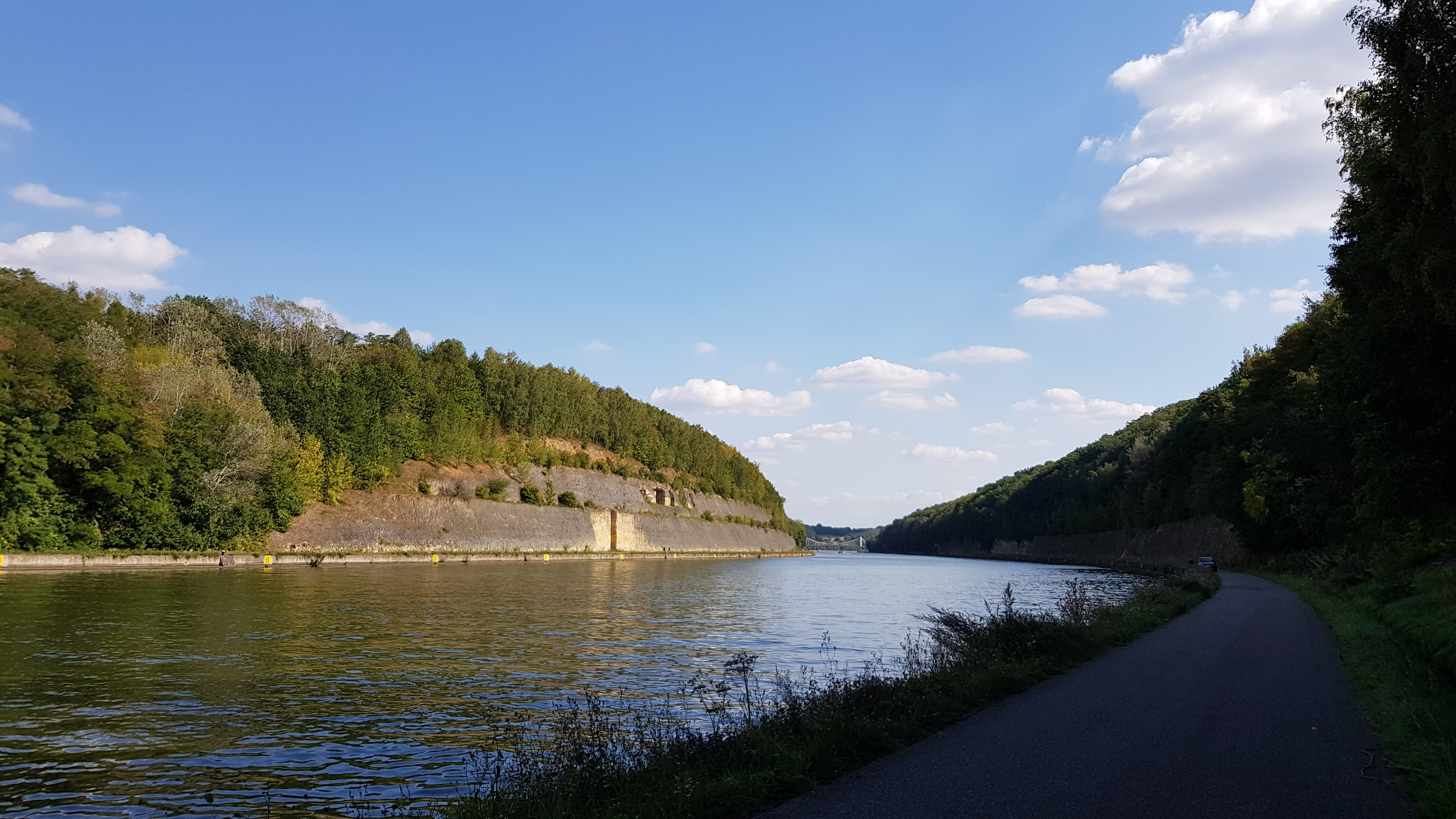 Groeve De Keel, Kanne, België